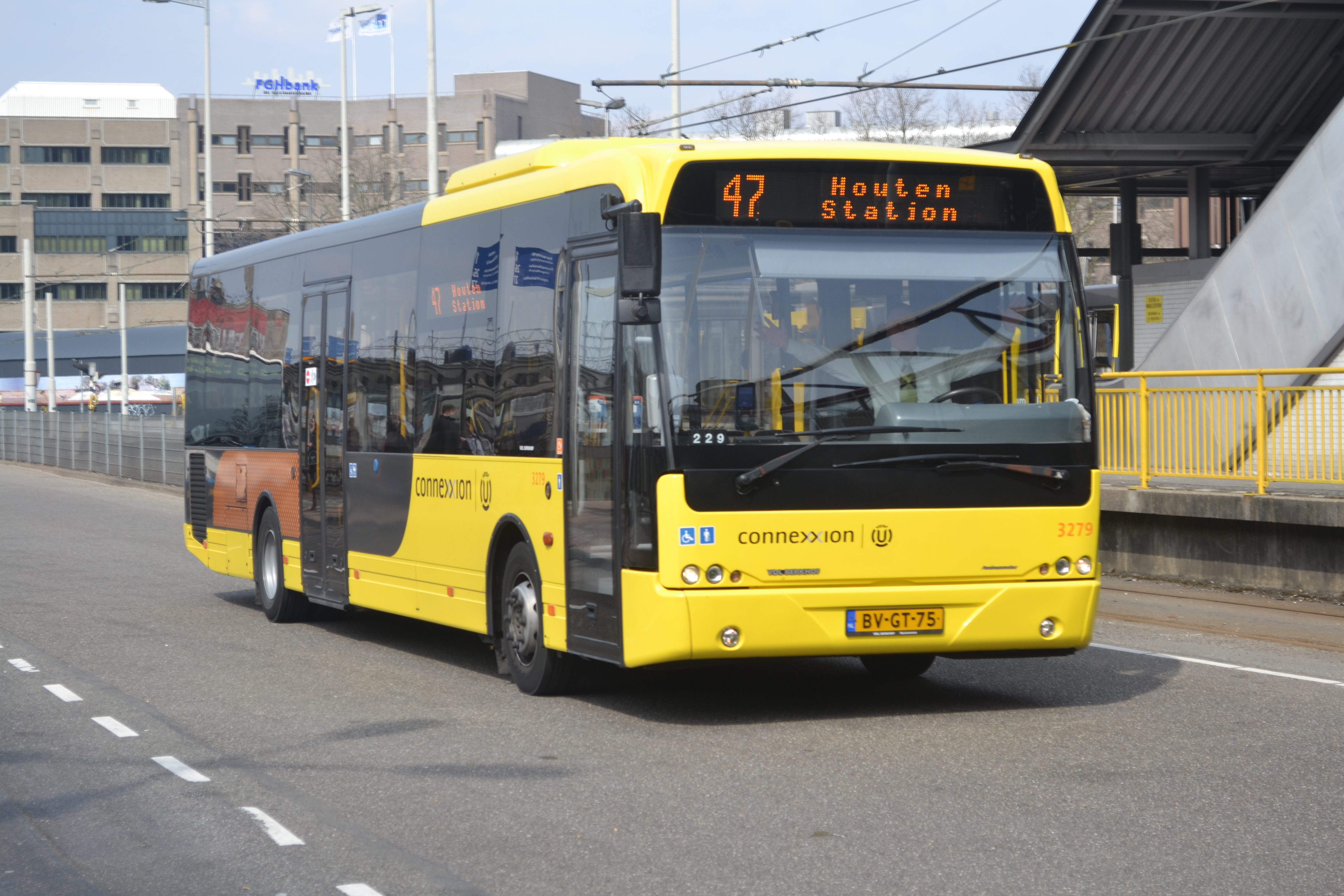 Connexxion 3268 met erg vrolijk gestemde chauf als lijn 47 naar Houten te Utrecht Centraal/Noord.